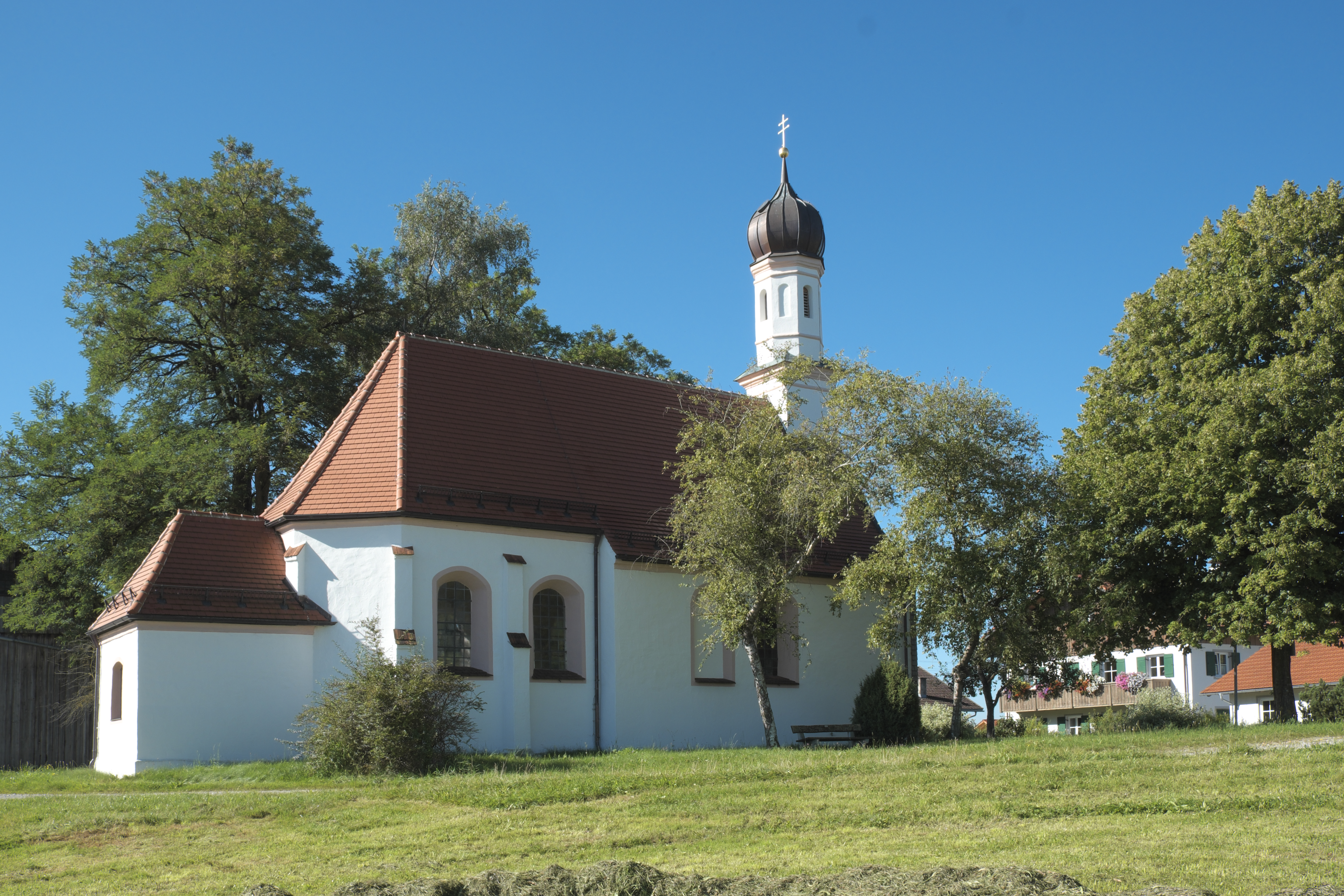 Katholische Kapelle Sankt Ottilia in Rott im Landkreis Landsberg am Lech (Bayern/Deutschland)